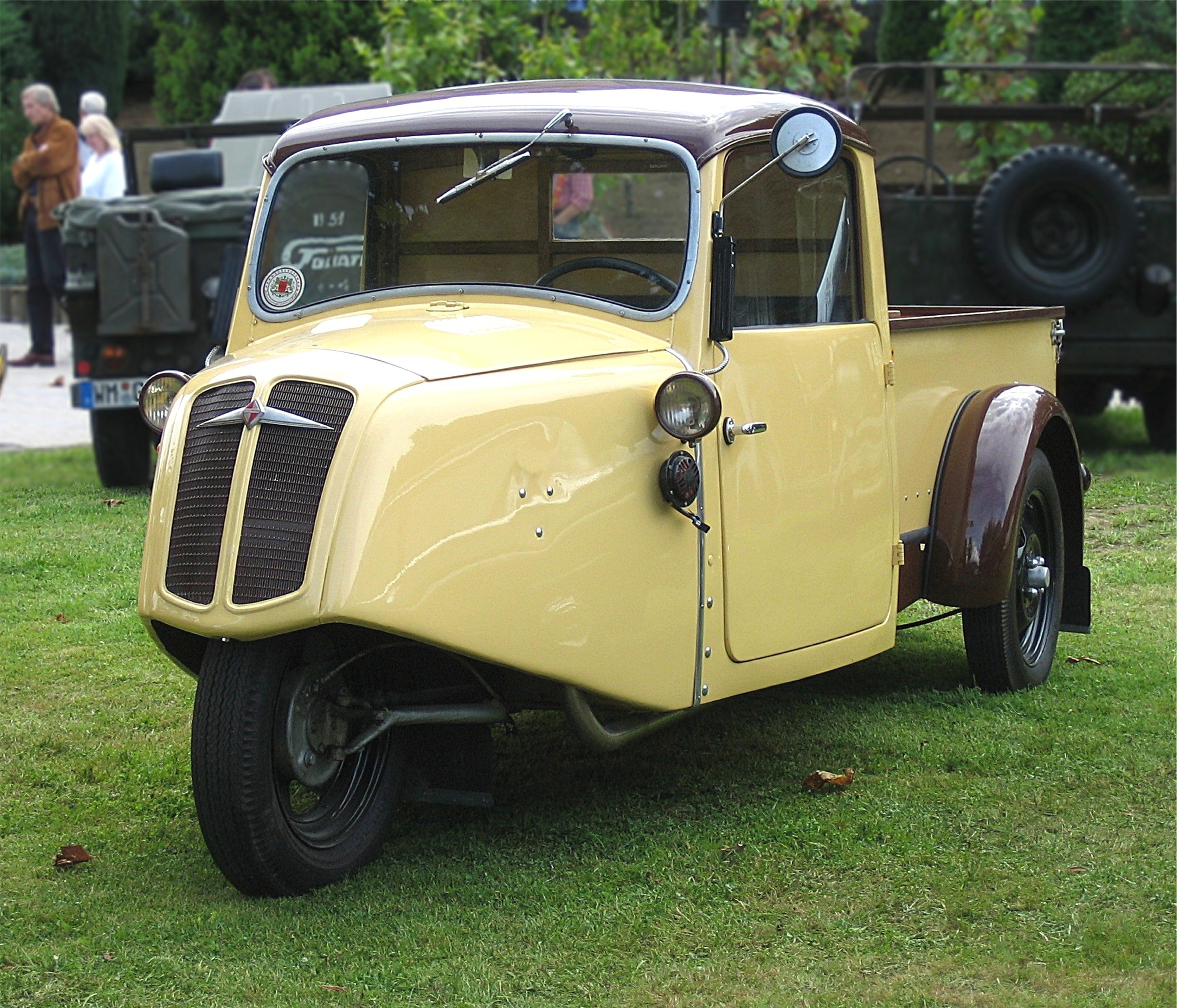 Borgward FW 200, 1-Zyl.-Zweitakt, 199 cm³, 6,5 PS, 35 km/h (Baujahr 1938) beim Borgwardtreffen in Andernach. Das W in der Typbezeichnung deutet auf Wasserkühlung hin, im Gegensatz zum F 200 mit Luftkühlung.